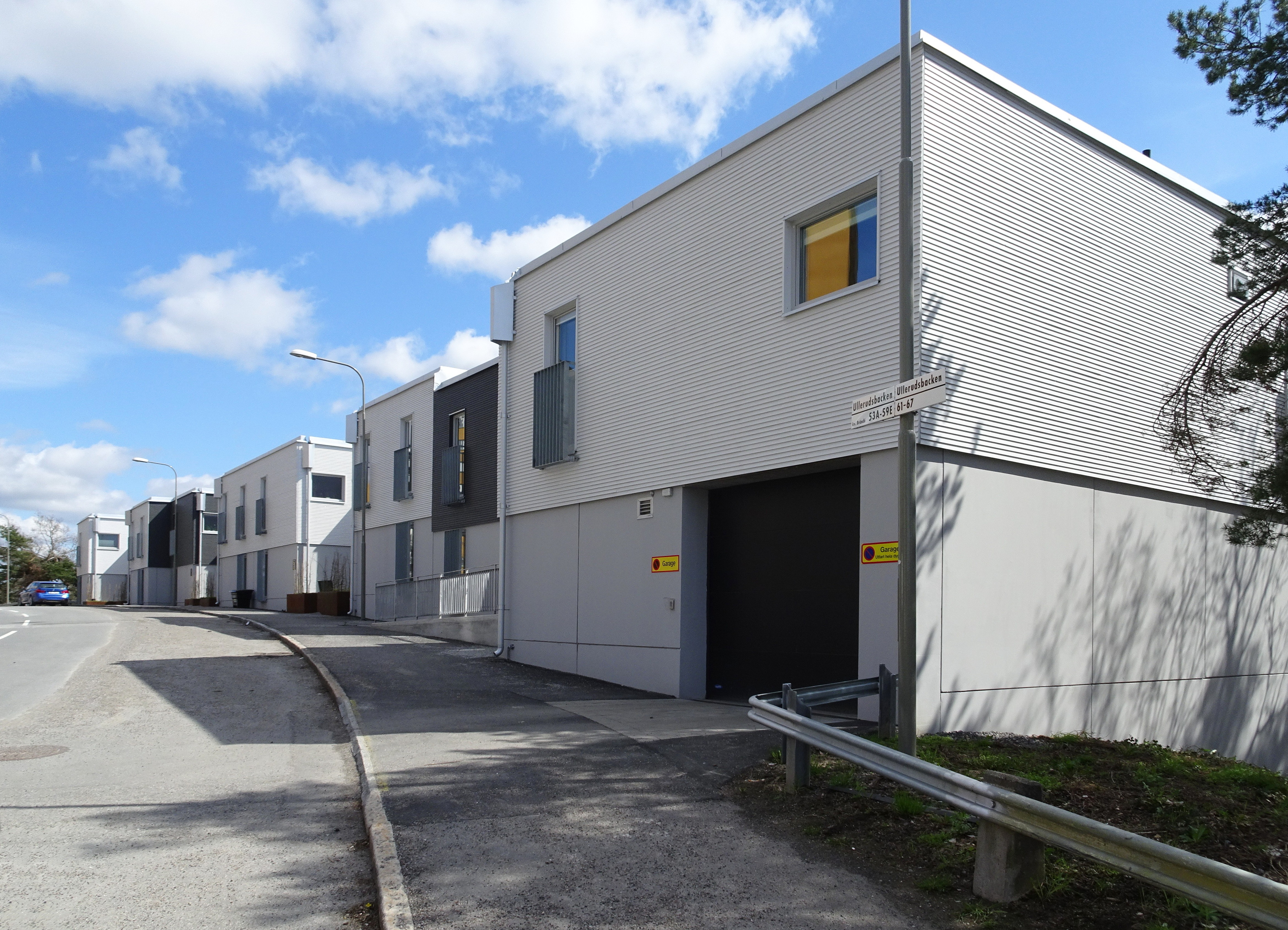 Fastigheten "Brändö 1" Farsta Strand. Terrasshus Magelungsterrassen vid Ullerudsbacken 59.